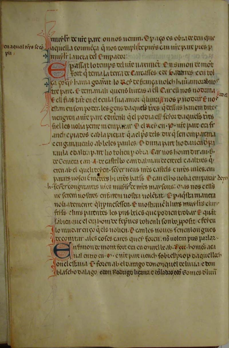 Crònica del rei en Jacme, La Batalla de Muret (p1)